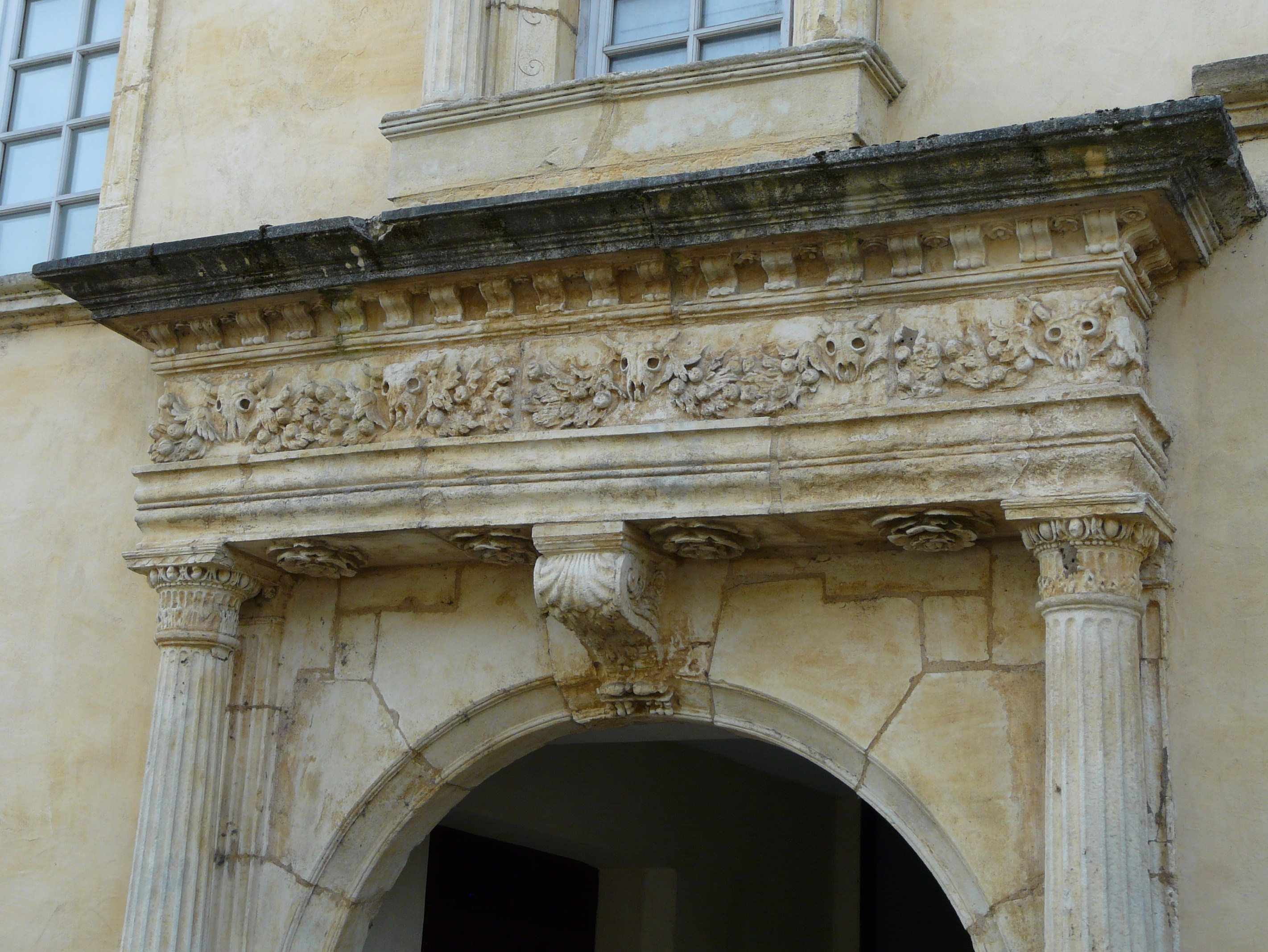 Sculptures de bucranes et de feuillages, linteau de la porte du bâtiment de l'institution Sévigné, côté boulevard Rodolphe-de-Turenne, Beaulieu-sur-Dordogne, Corrèze, France.